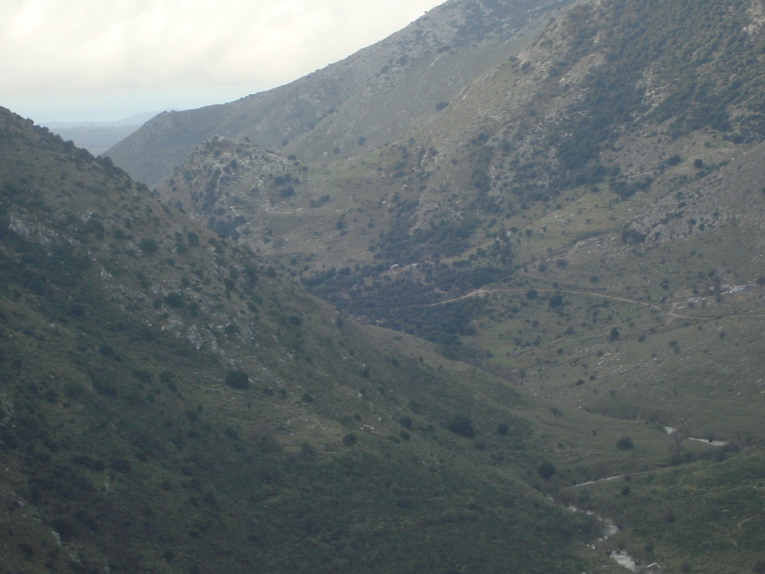 ο λόφος όπου βρίσκονται τα ερείπια του κάστρου της Οχιάς